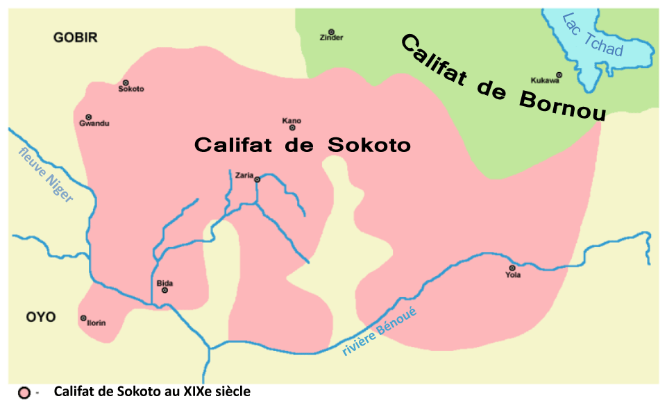 Version plus grande. Traduction d'une carte en anglais.